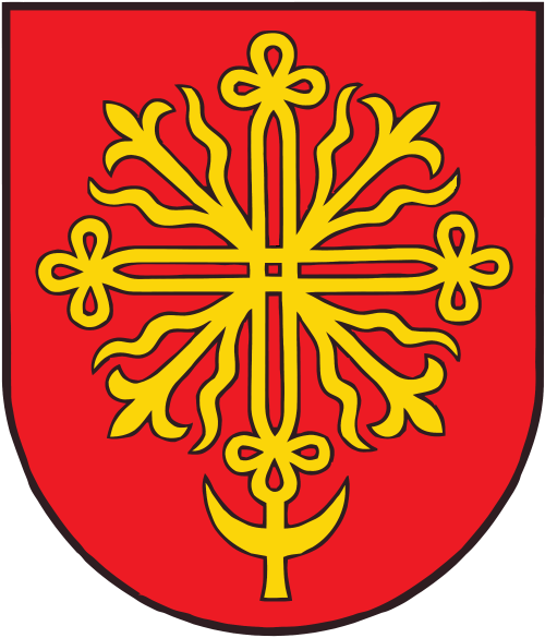 Kriukų herbas